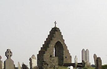 OldStMaur